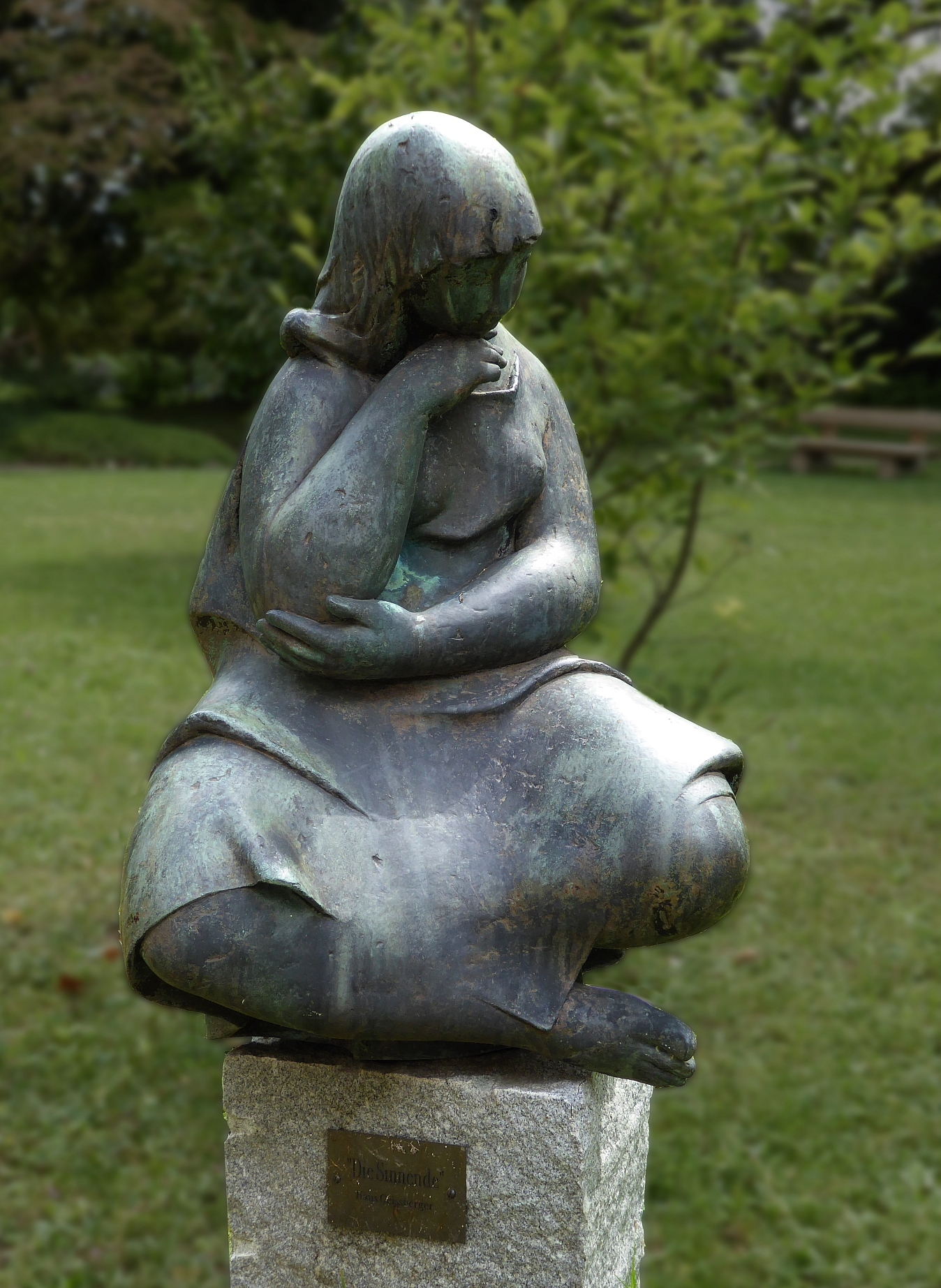 Hans Geissberger (1921–1999) Bildhauer und Maler, Skulptur »Die Sinnende» in Arlesheim